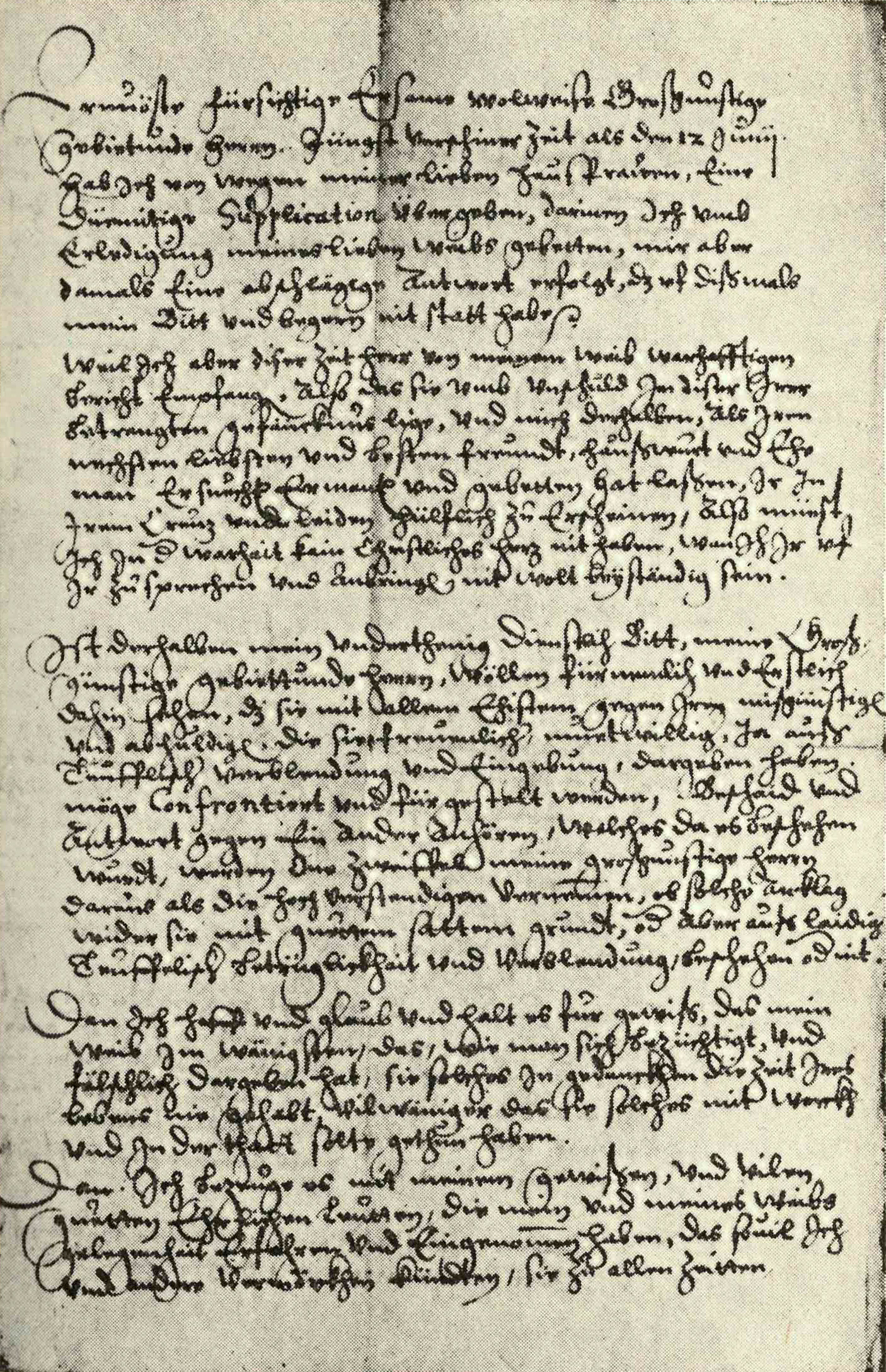 Dokument im Hexenprozess gegen Rebekka Lemp 1590 in Nördlingen. Bittbrief (Vorderseite) von Peter Lemp an den Rat der Stadt vom 13. Juli 1590.